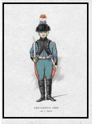 Afbeelding van een pontonnier van het Franse leger.